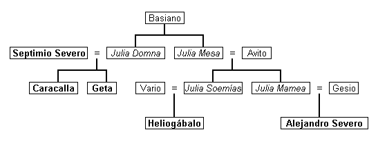 Árbol genealógico de los emperadores de la dinastía de los Severos